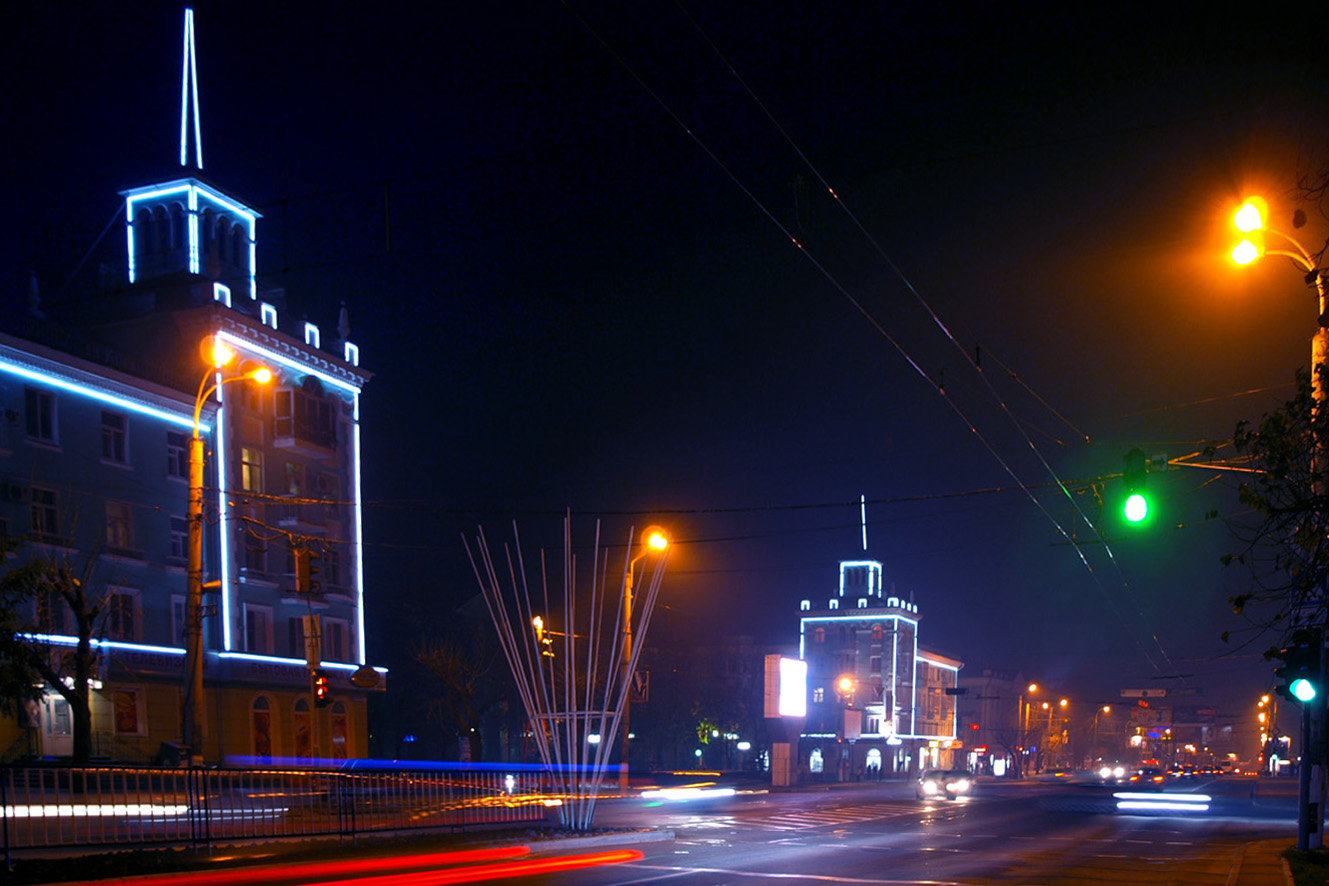 Будинки зі шпилем (Луганськ)